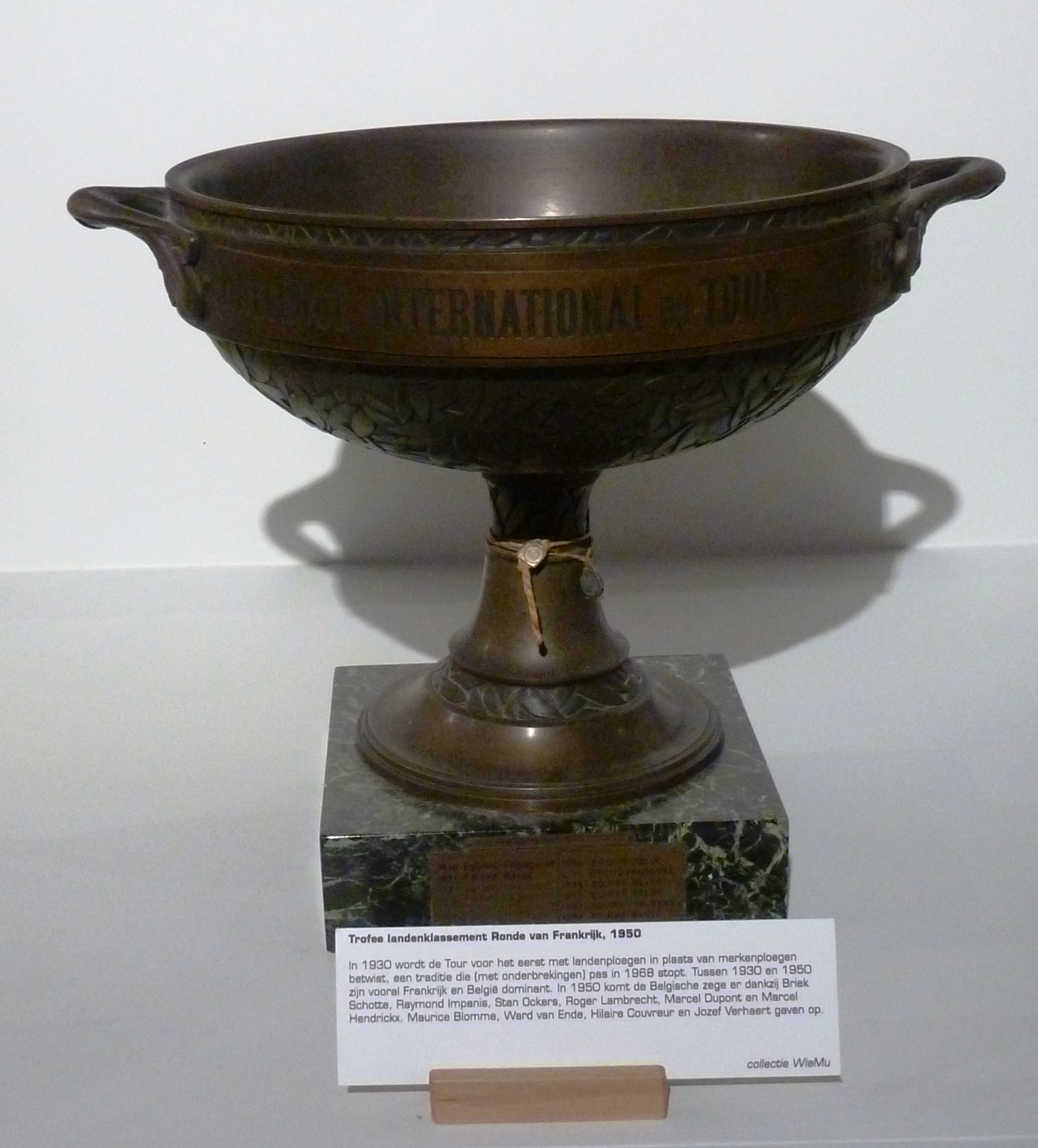 Trophäe für die Gewinner Nationenwertung der Tour de France 1950 (Belgien) im National Wielermuseum in Roeselaere, Belgien